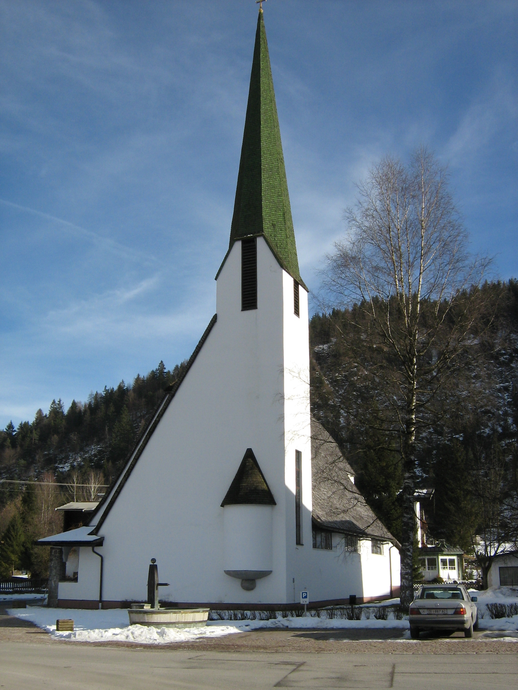 La katolika preĝejo en la tirola vilagxo Erpfendorf (Aŭstrio), kies arĥitekto estis Clemens Holzmeister.